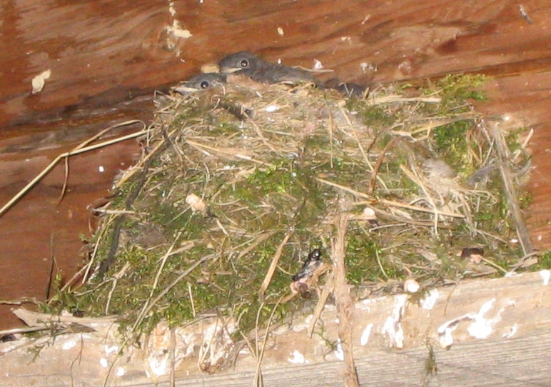 Nest im Freilichtmuseum Neuhausen ob Eck